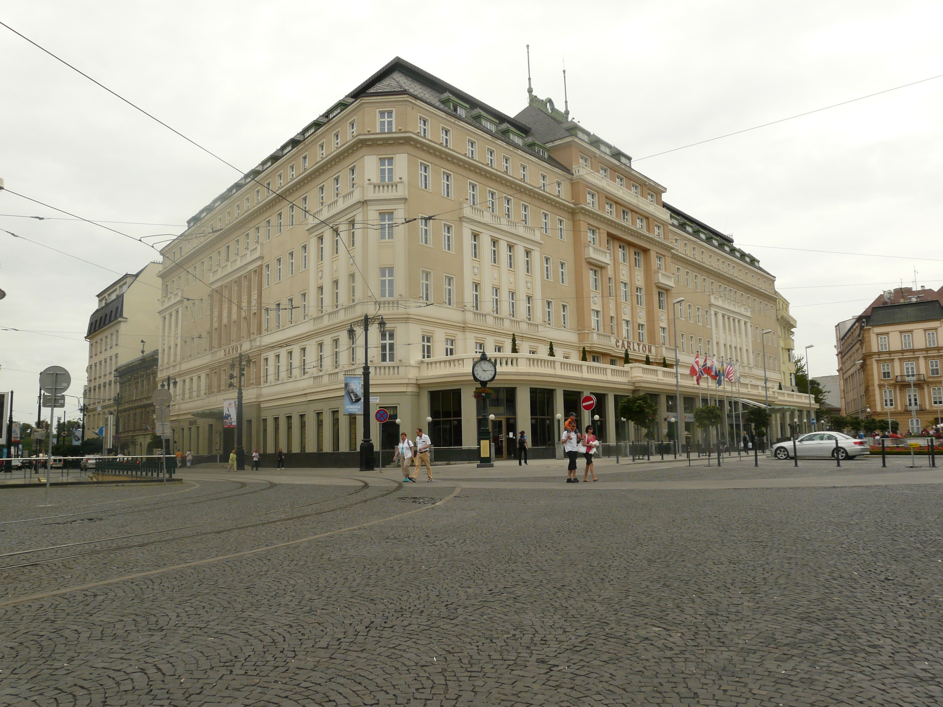 carlton